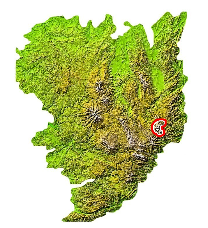 Situation du massif du Mézenc sur la carte du Massif central (France)